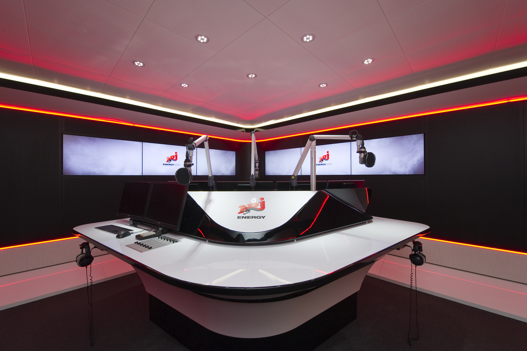 Das Studio von Energy Bern (Eröffnung: Februar 2013)